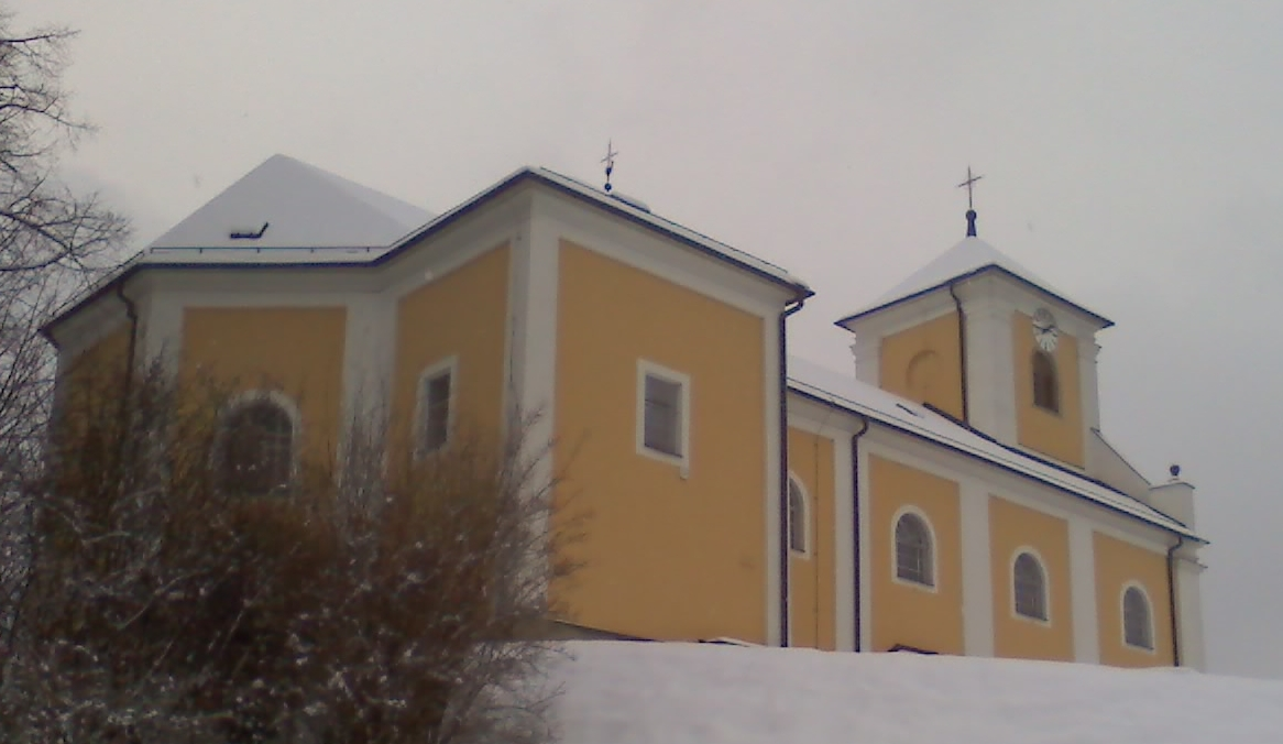 Želechovice nad Dřevnicí - kostel